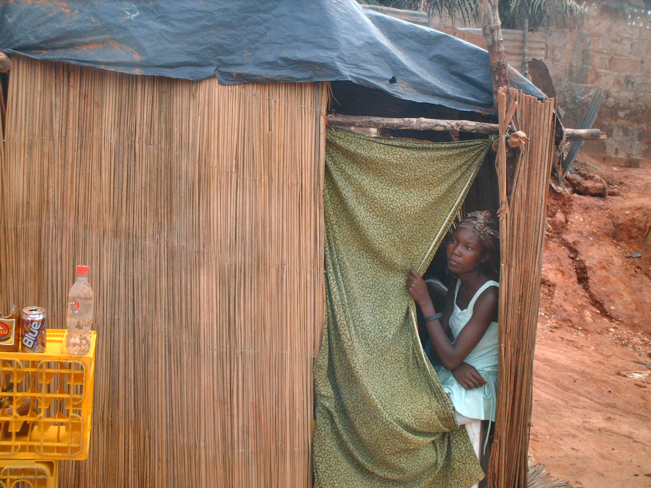 Essa imagem me marcou muito. Após perceber que eu havia tirado a foto, ela deu um enorme sorriso.